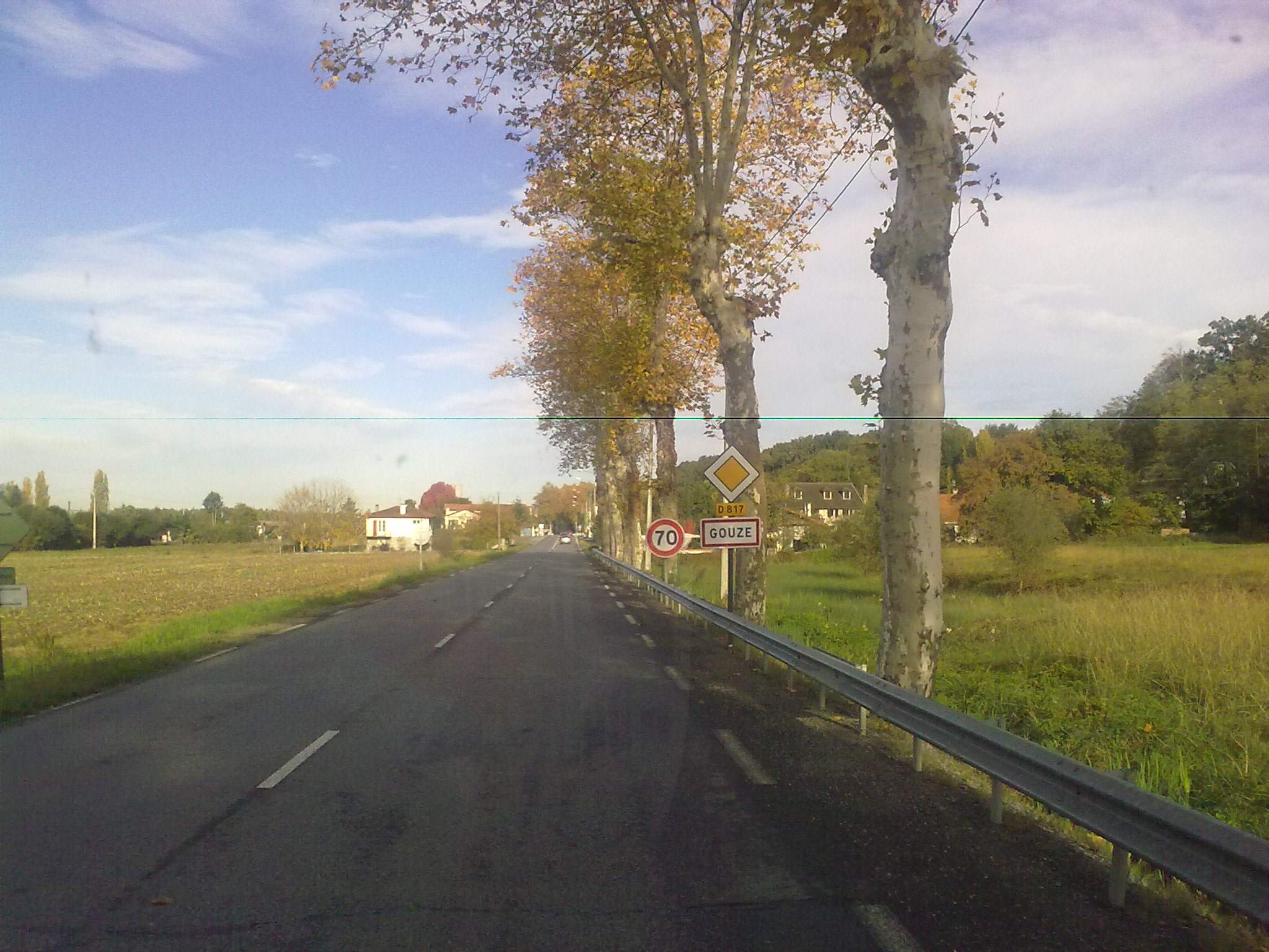 Entrée dans Gouze (Pyrénées-Atlantiques)